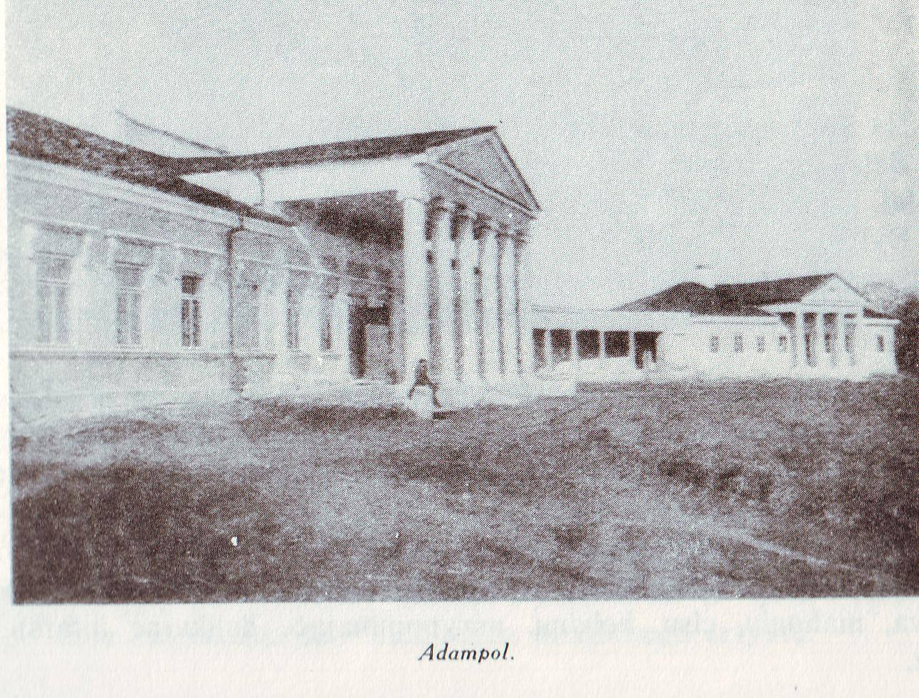 Adampol - pałac